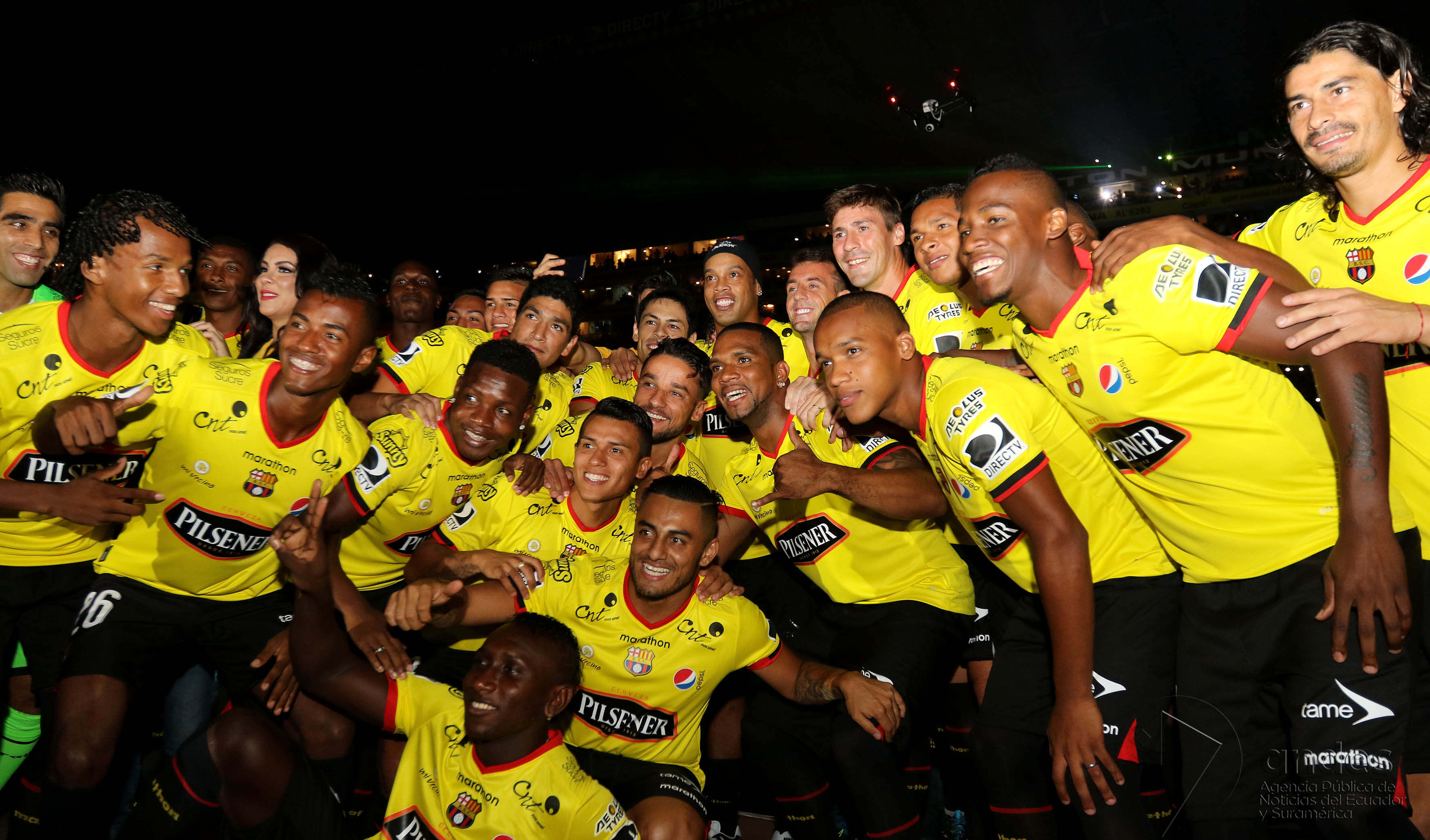 Guayaquil, 29 enero del 2016 (Andes).-Jugadores de barcelona durante la Noche Amarilla en el estadio MonumentalFoto:Andes/César Muñoz